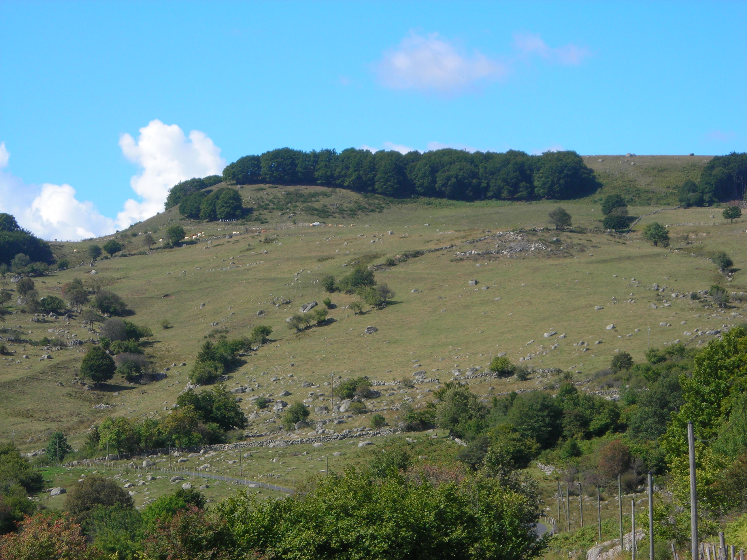 Face sud-est de la montagne de Rabios (Lozère, France).